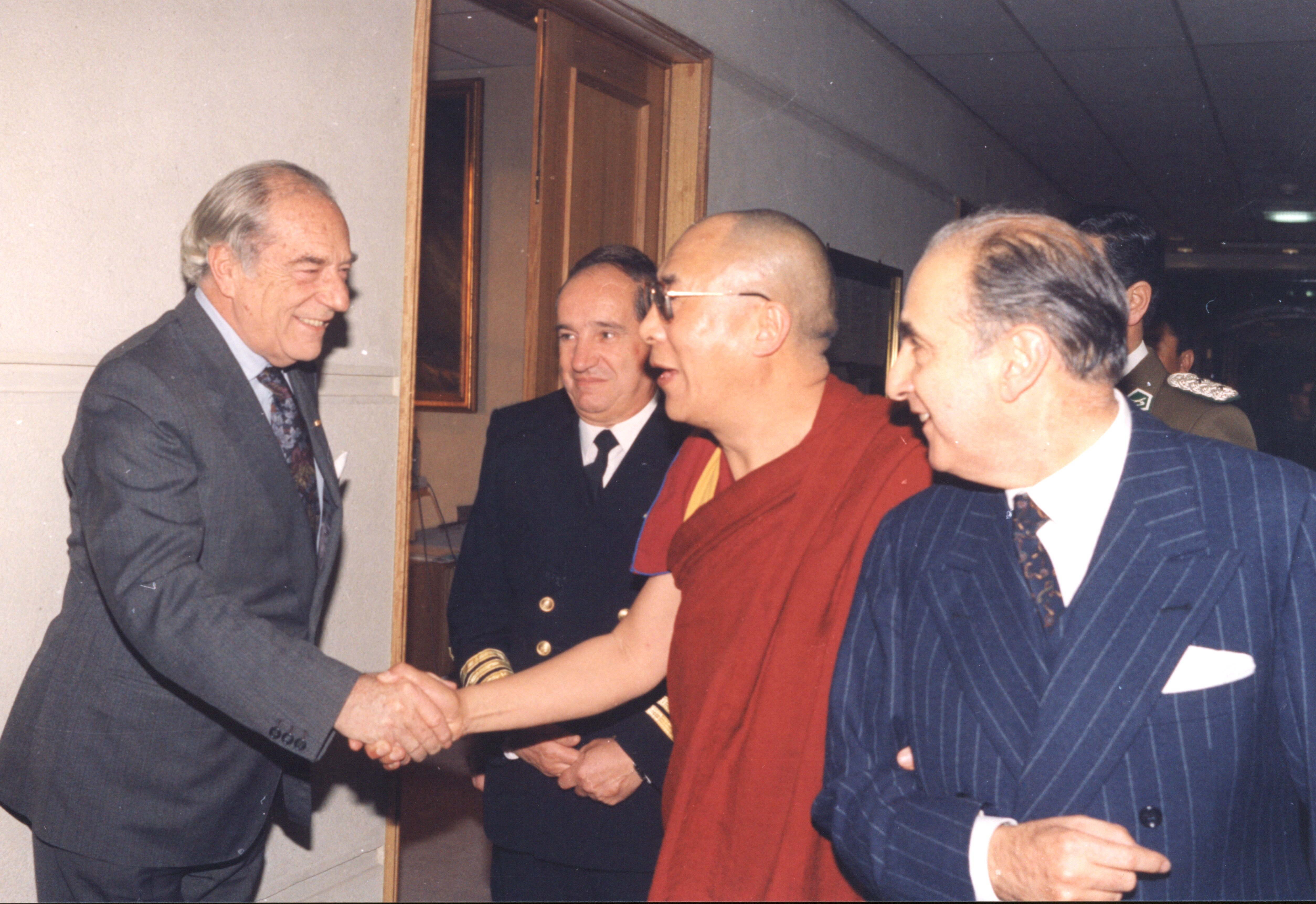 Gabriel Valdés fue ministro de Relaciones Exteriores, presidente del Senado y reconocido líder dentro de la DC